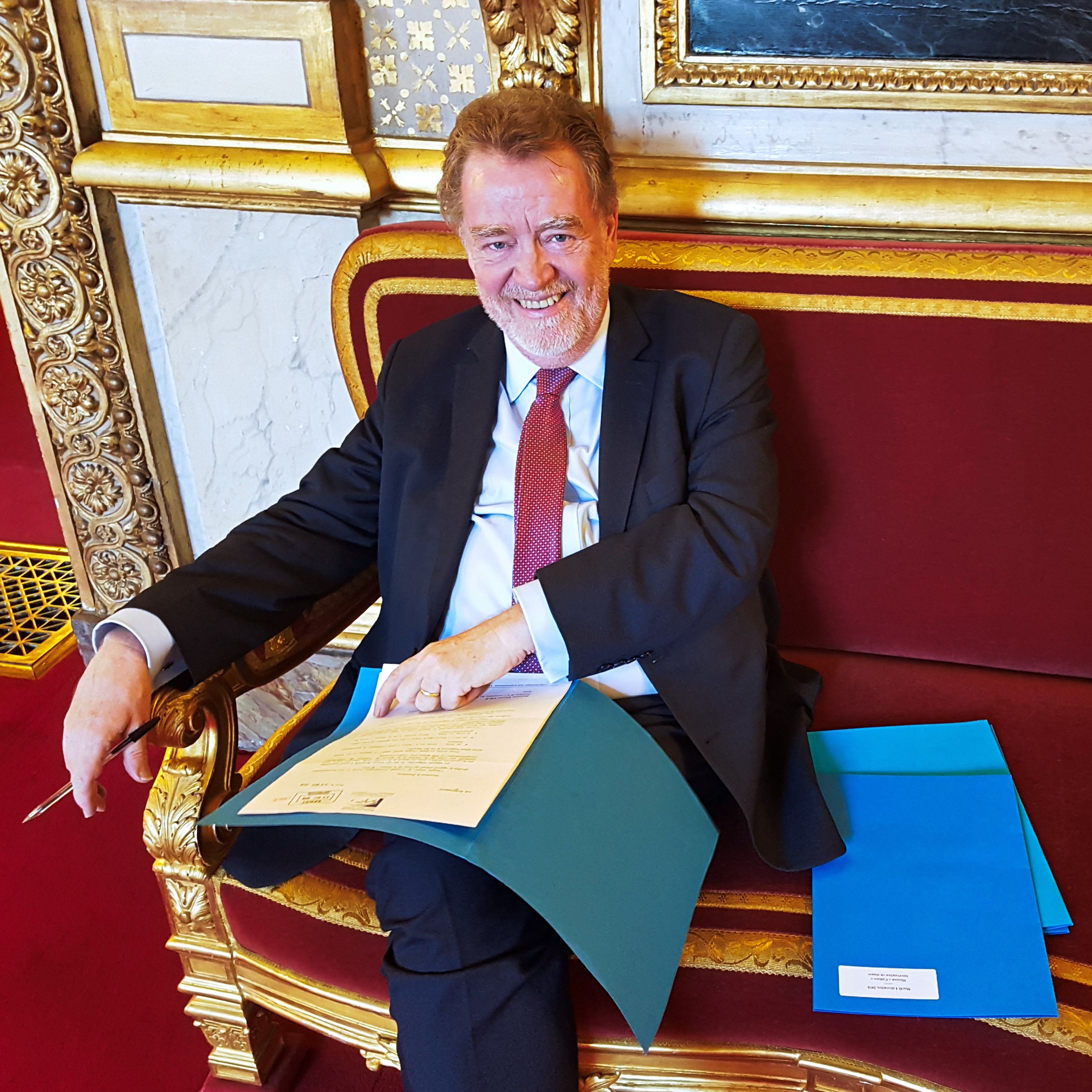 Sénateur Vincent Éblé, décembre 2018, dans la salle des Conférences du Sénat